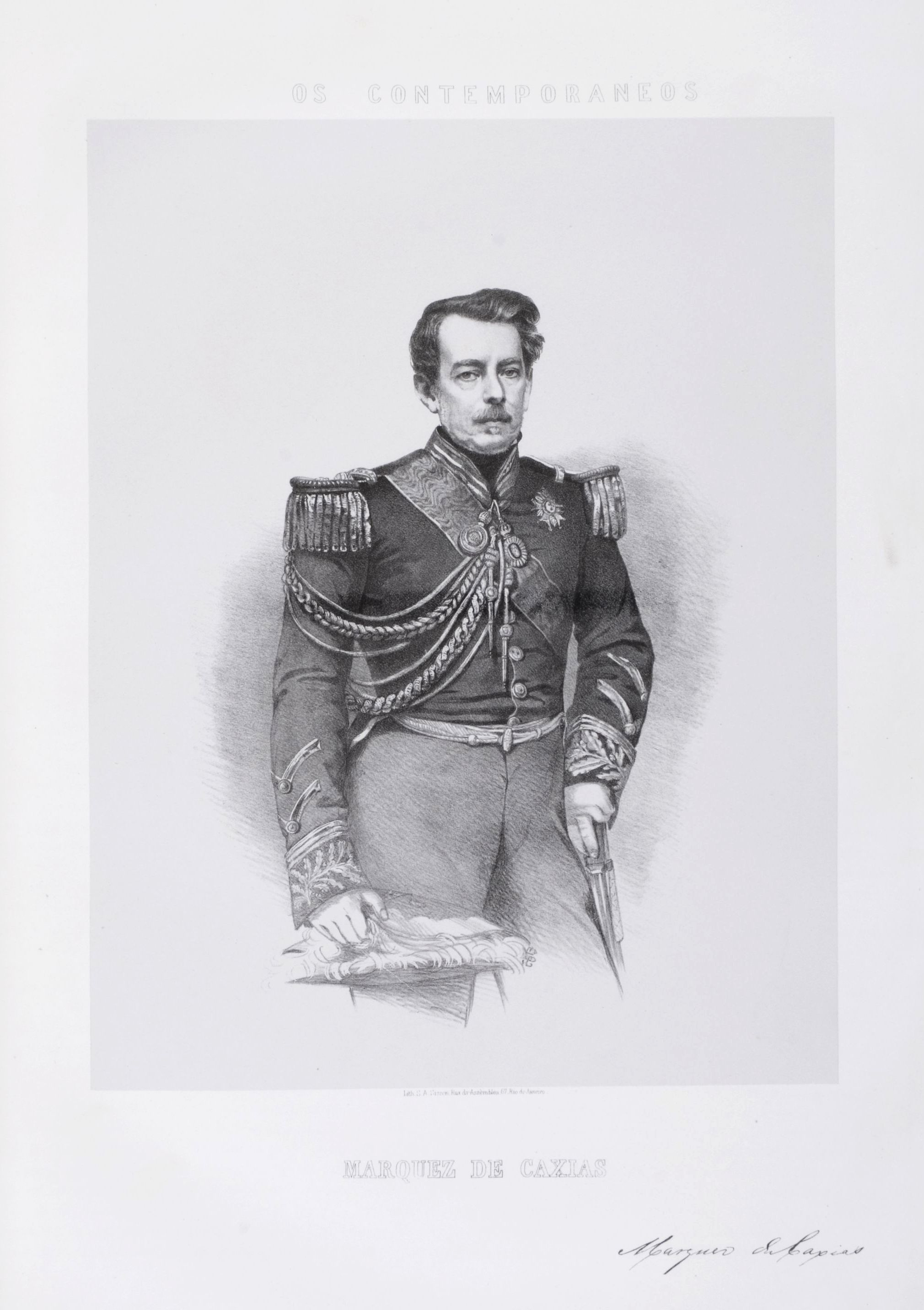 Litografia em preto e branco